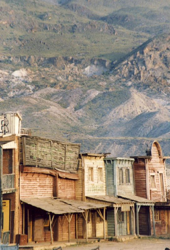 Décors du film Le Bon, la Brute et le Truand